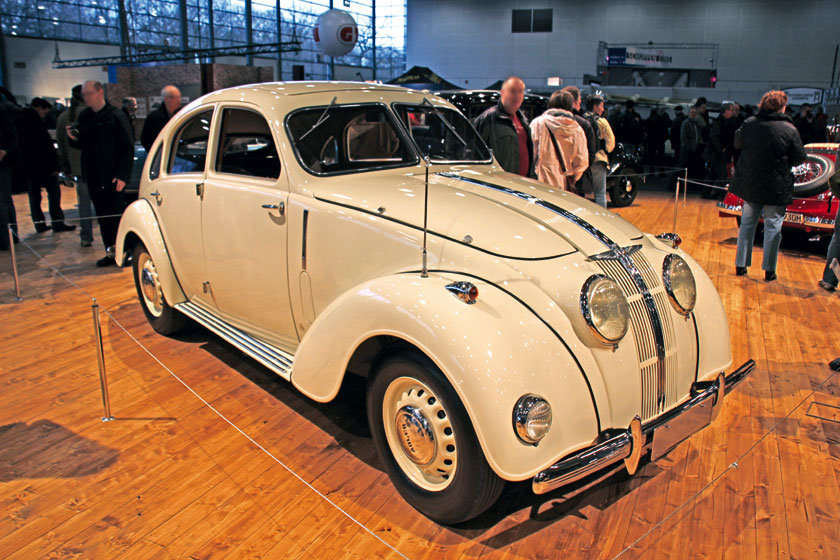 1938 Adler 2,5 Liter Autobahn Karosserie Ambi-Budd